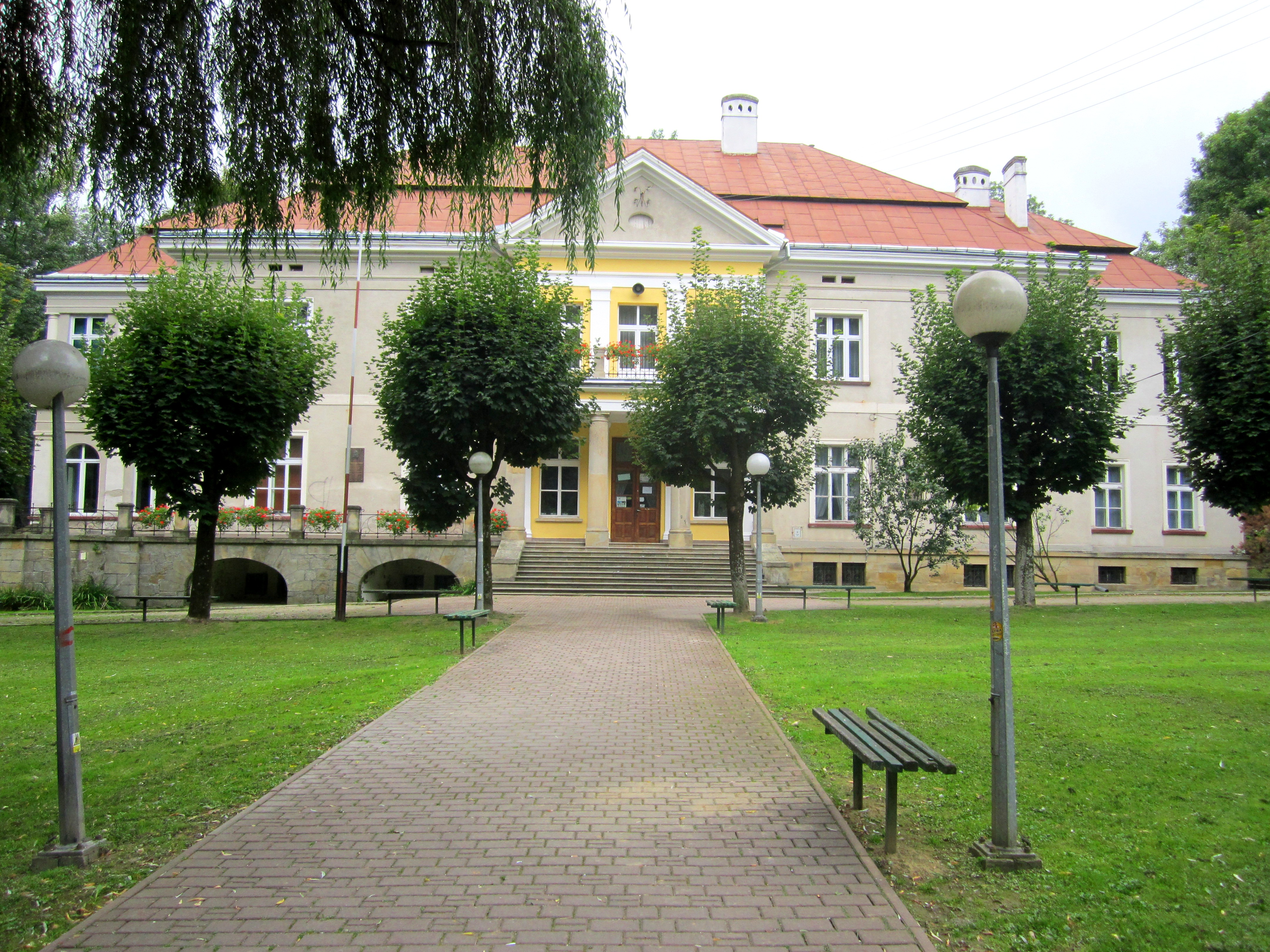 Jedlicze - pałac Stawiarskich, obecnie LO im. Marii Konopnickiej, 1915-1925